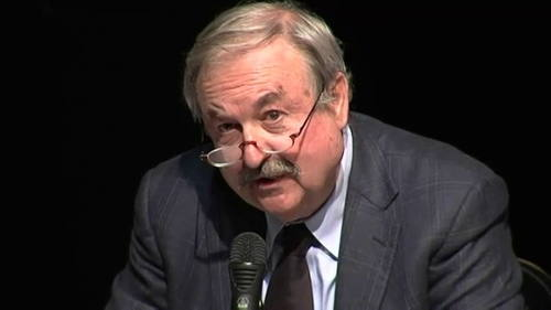 Walter Santagata